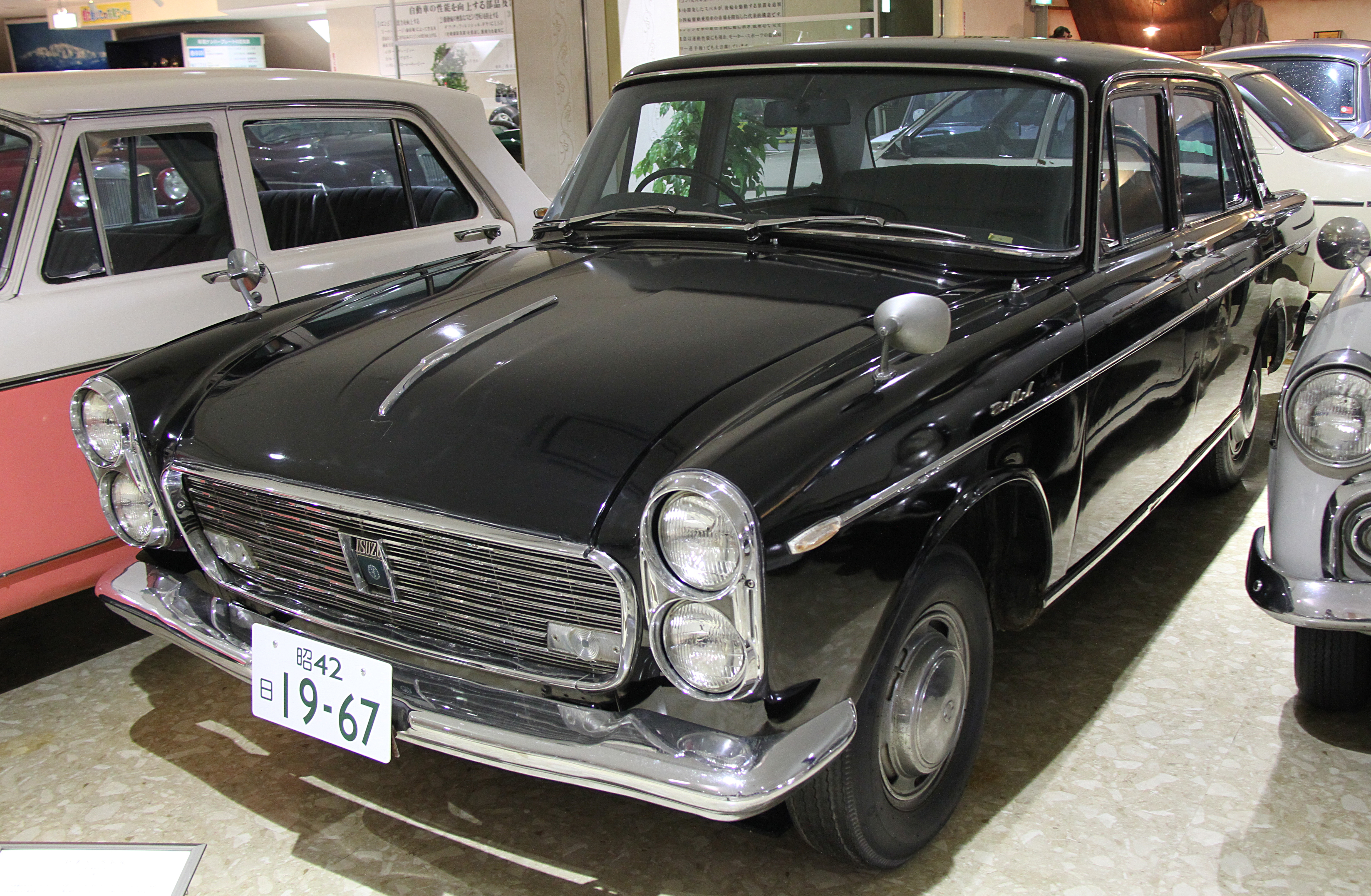 Isuzu Bellel